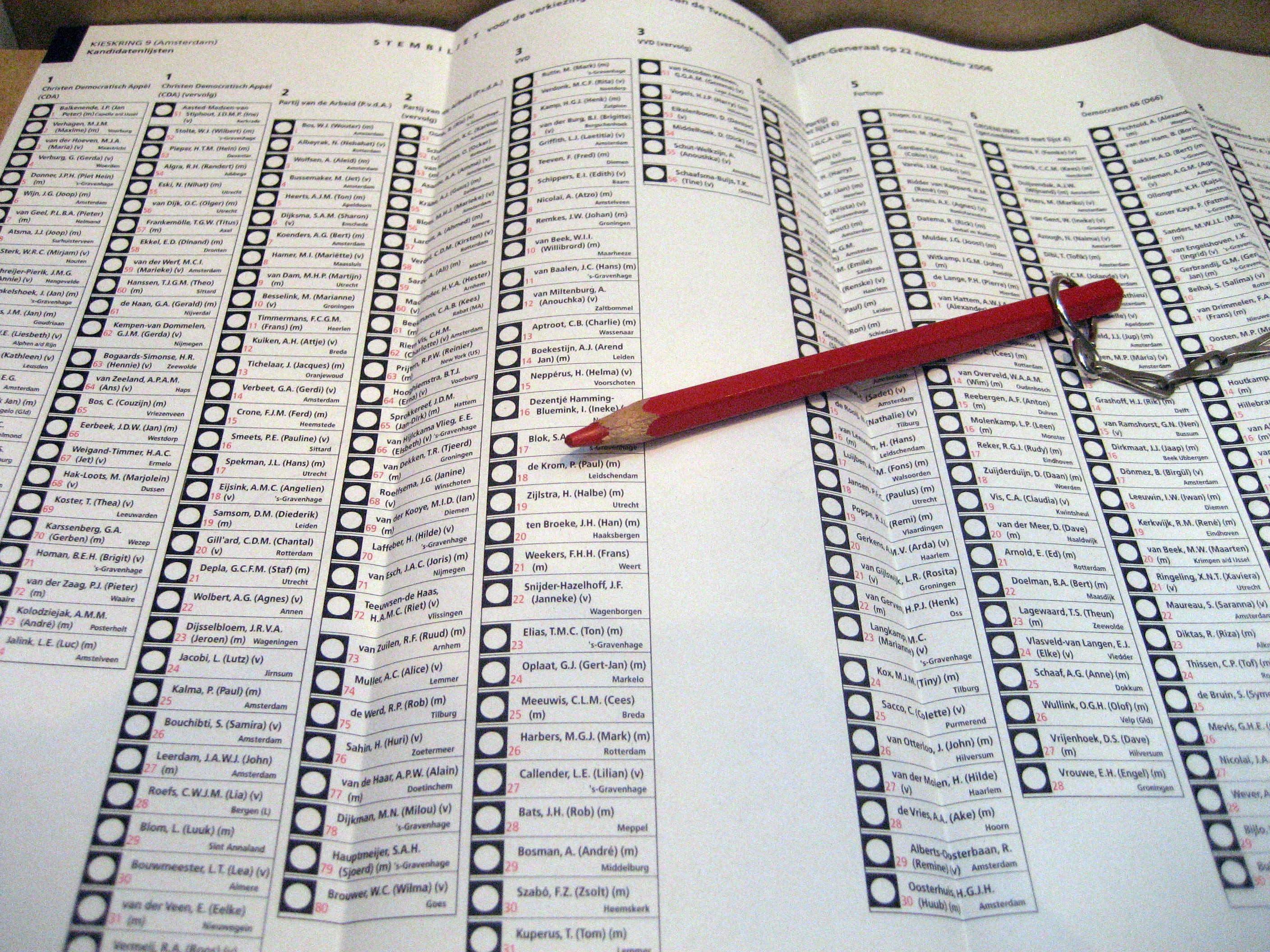 Stemmen met rood potlood.